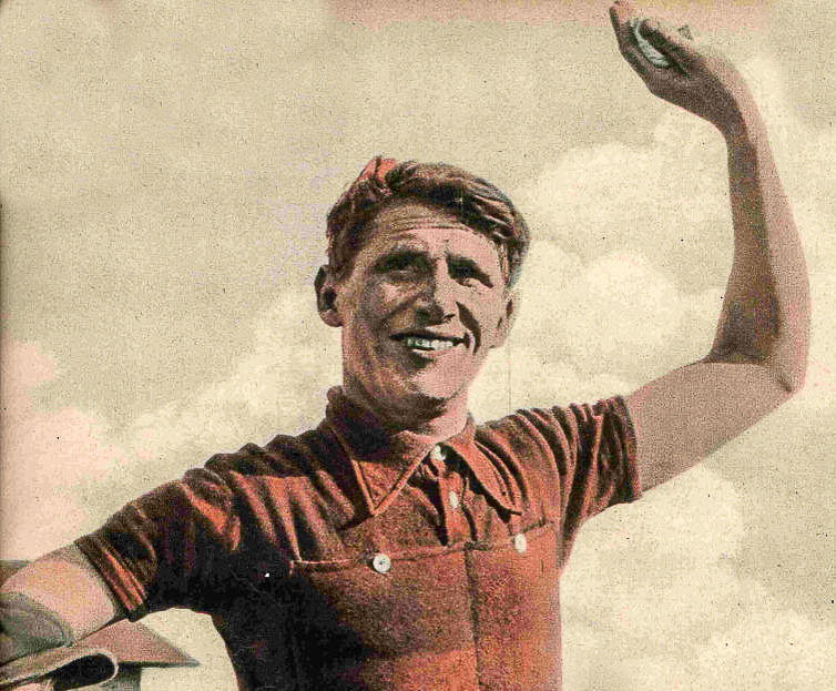 De Josy Mersch op der Page de couverture vun der A-Z no senger Victoire am 11. Critérium International de cyclo-cross pédestre den 3. Februar 1935 zu Suresnes bei Paräis.